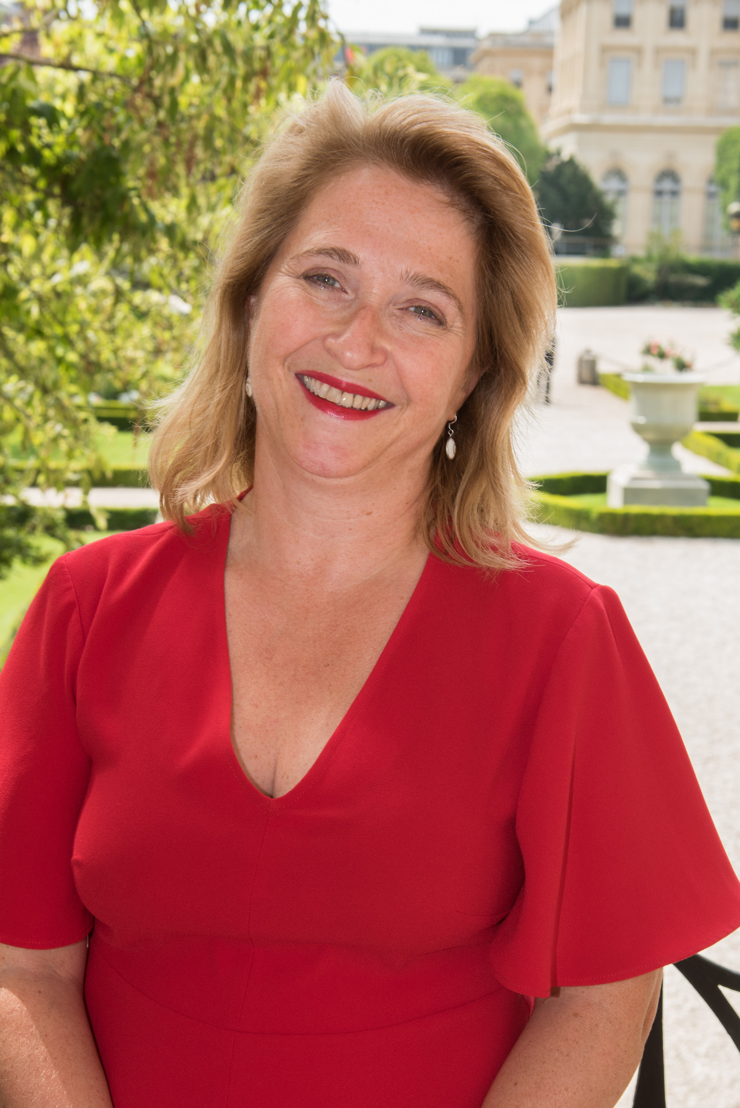 Véronique Hammerer dans le jardin des Quatre colonnes du palais Bourbon.